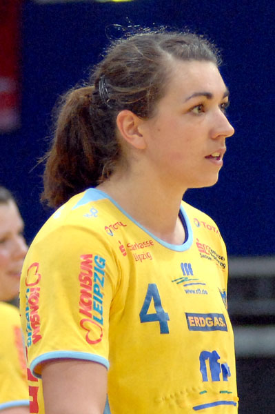 Portrait Foto Sara Holmgren